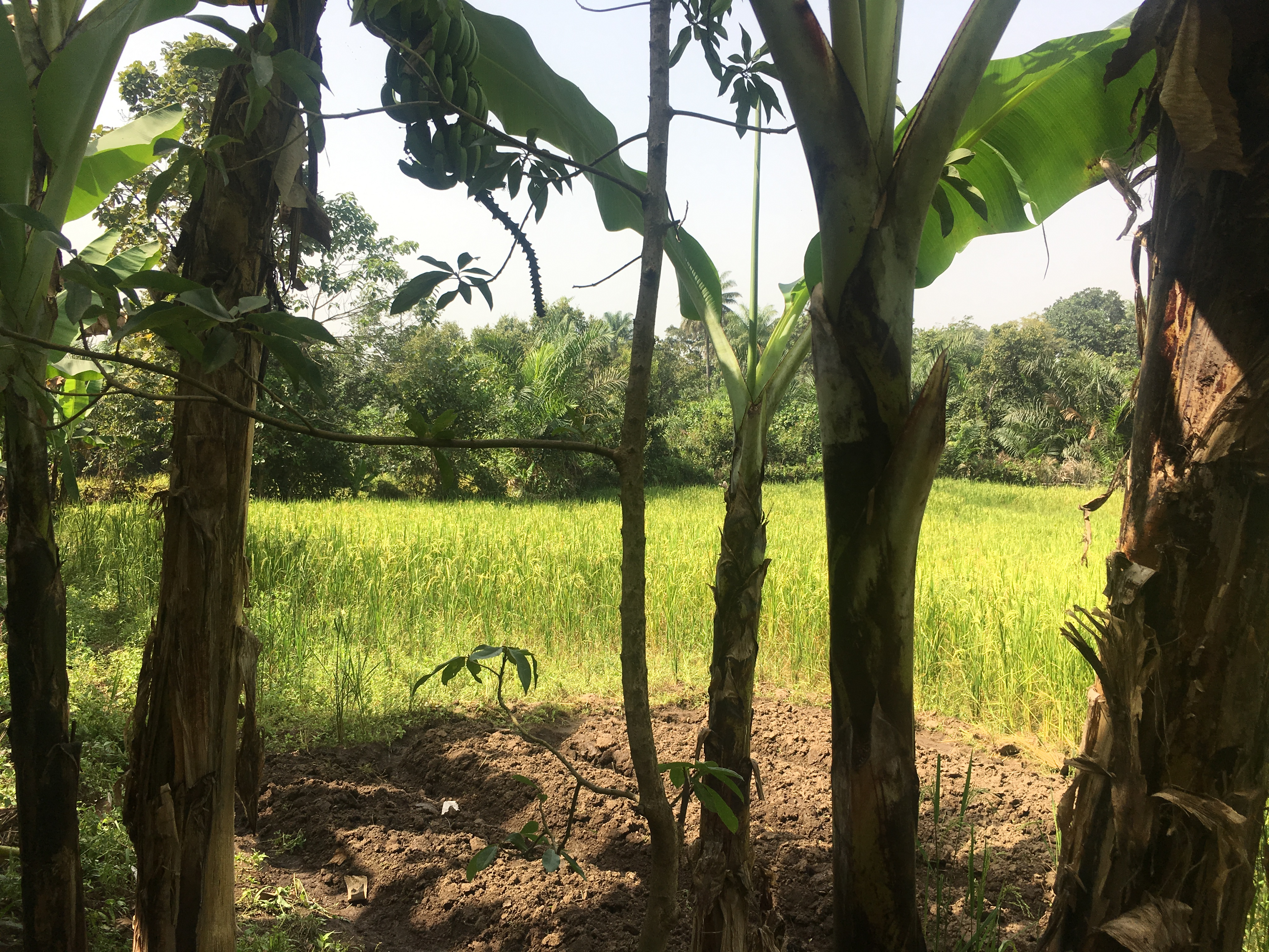 Reisfeld unweit von Télimelé